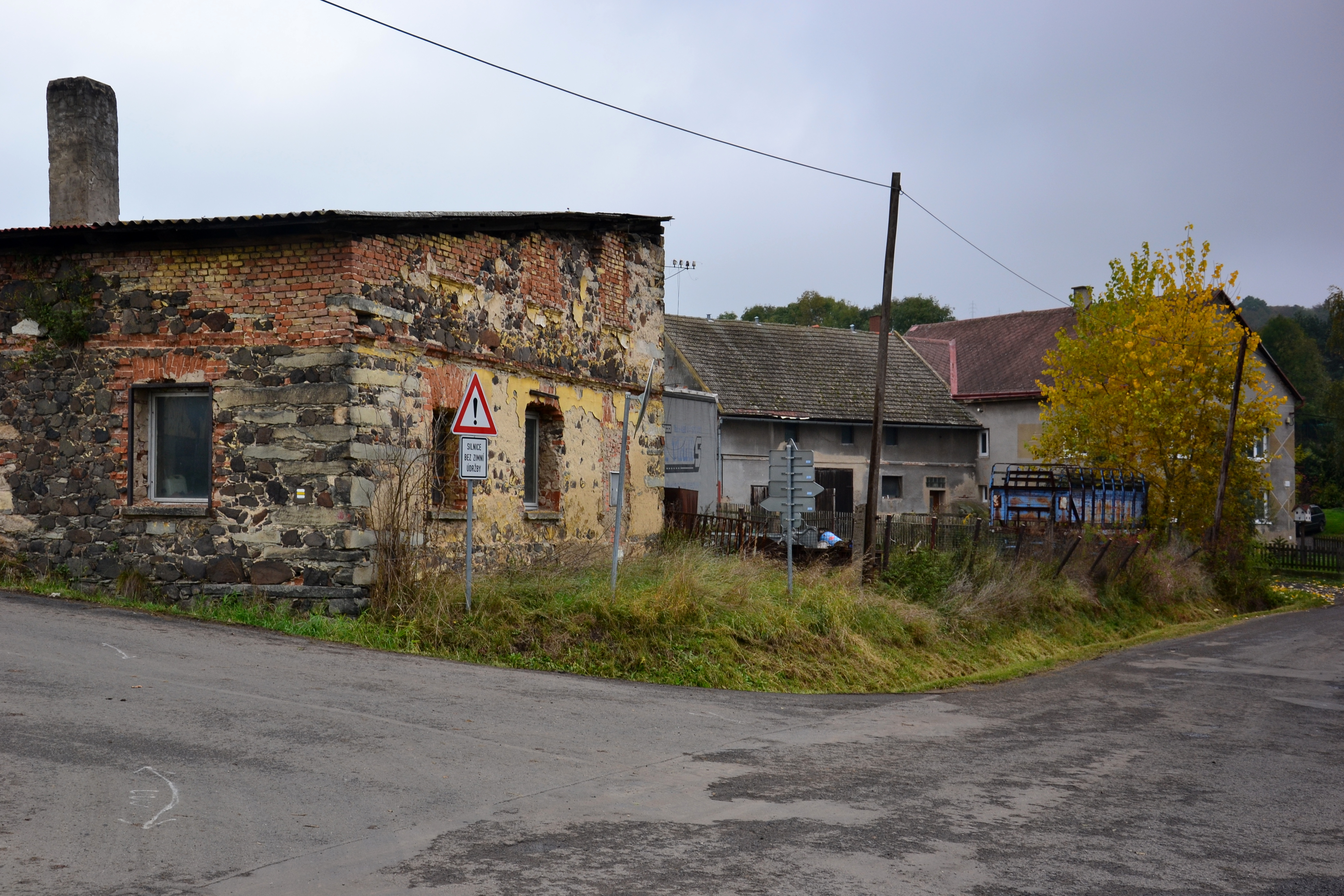 Hospodářský areál a dům čp. 1 na západním konci vesnice